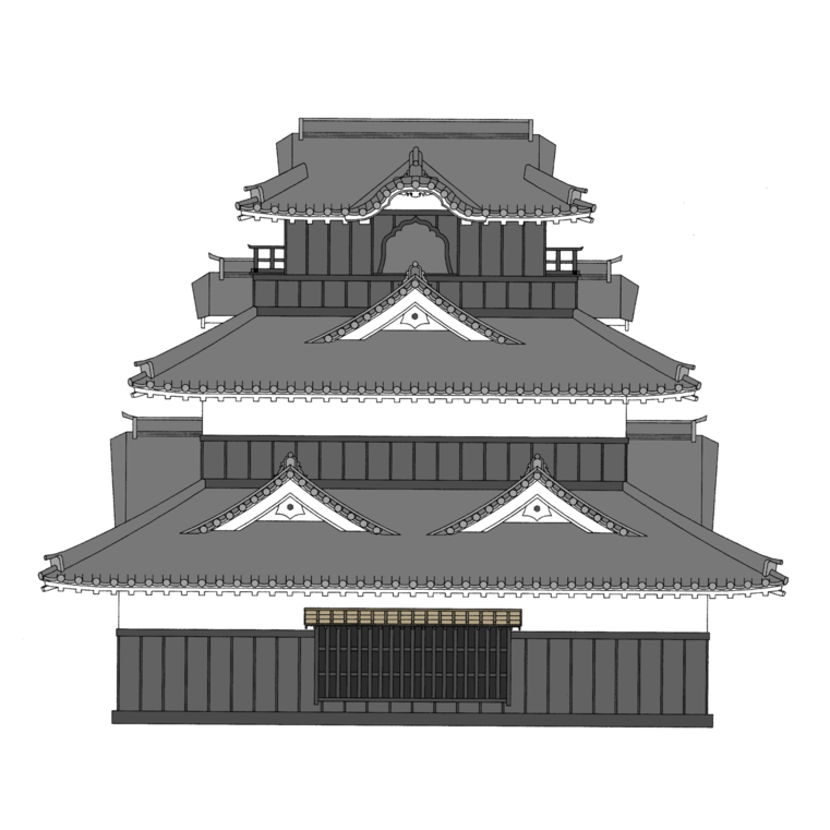 岐阜県岐阜市、加納城にあった御三階櫓の東立面の復元例図。矩形、高さ寸法については文献に従っているが、細部（板や瓦のサイズ）については言及された記述が認められないため、作図者の考察による。